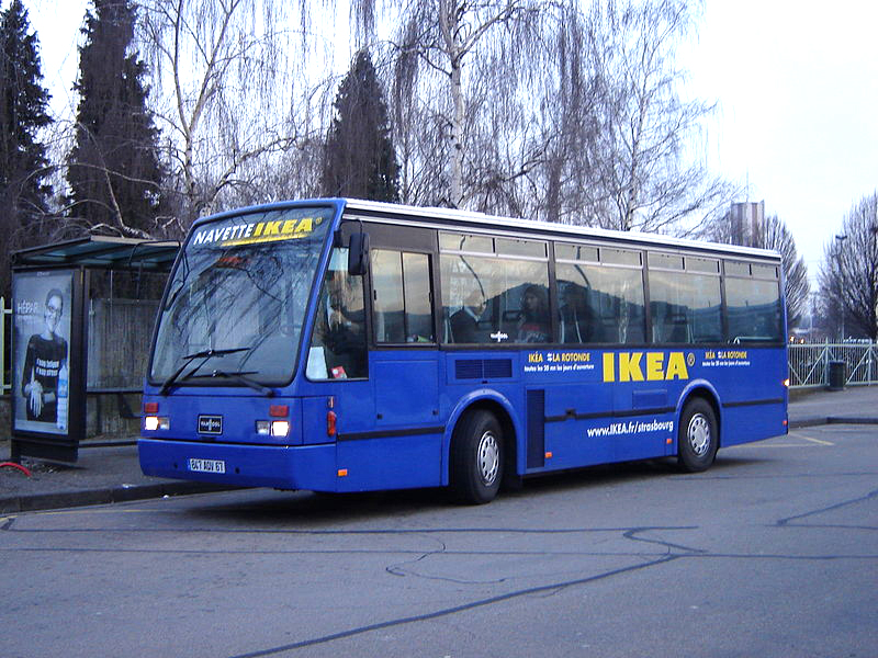 Un bus Van Hool A 508 sur la Navette du magasin IKEA Strasbourg